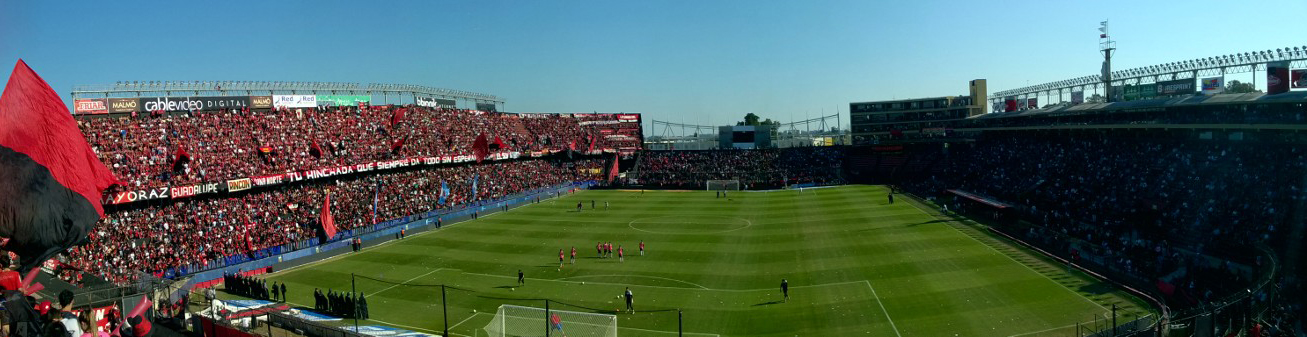 Foto panorámica del estadio Brigadier López.